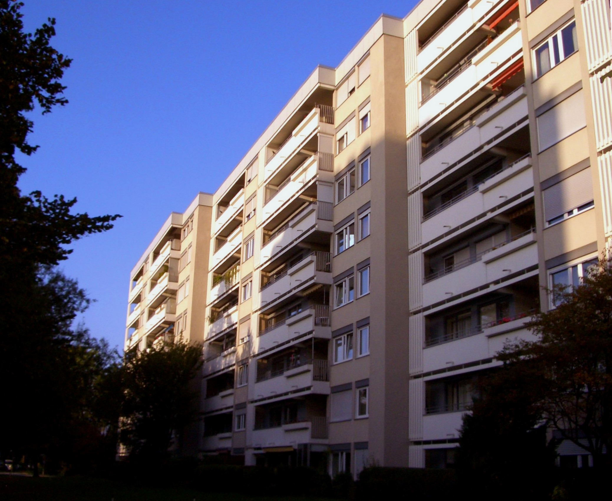 8-geschossiger Wohnblock in München-Fideliopark (errichtet für Eigentumswohnungen)